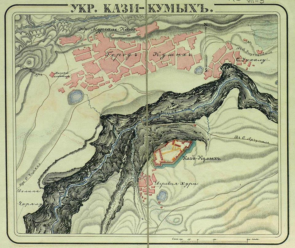 Лакский район, с. Хури